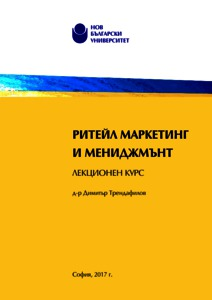 Корица на книга Ритейл маркетинг и мениджмънт (ел-издание)